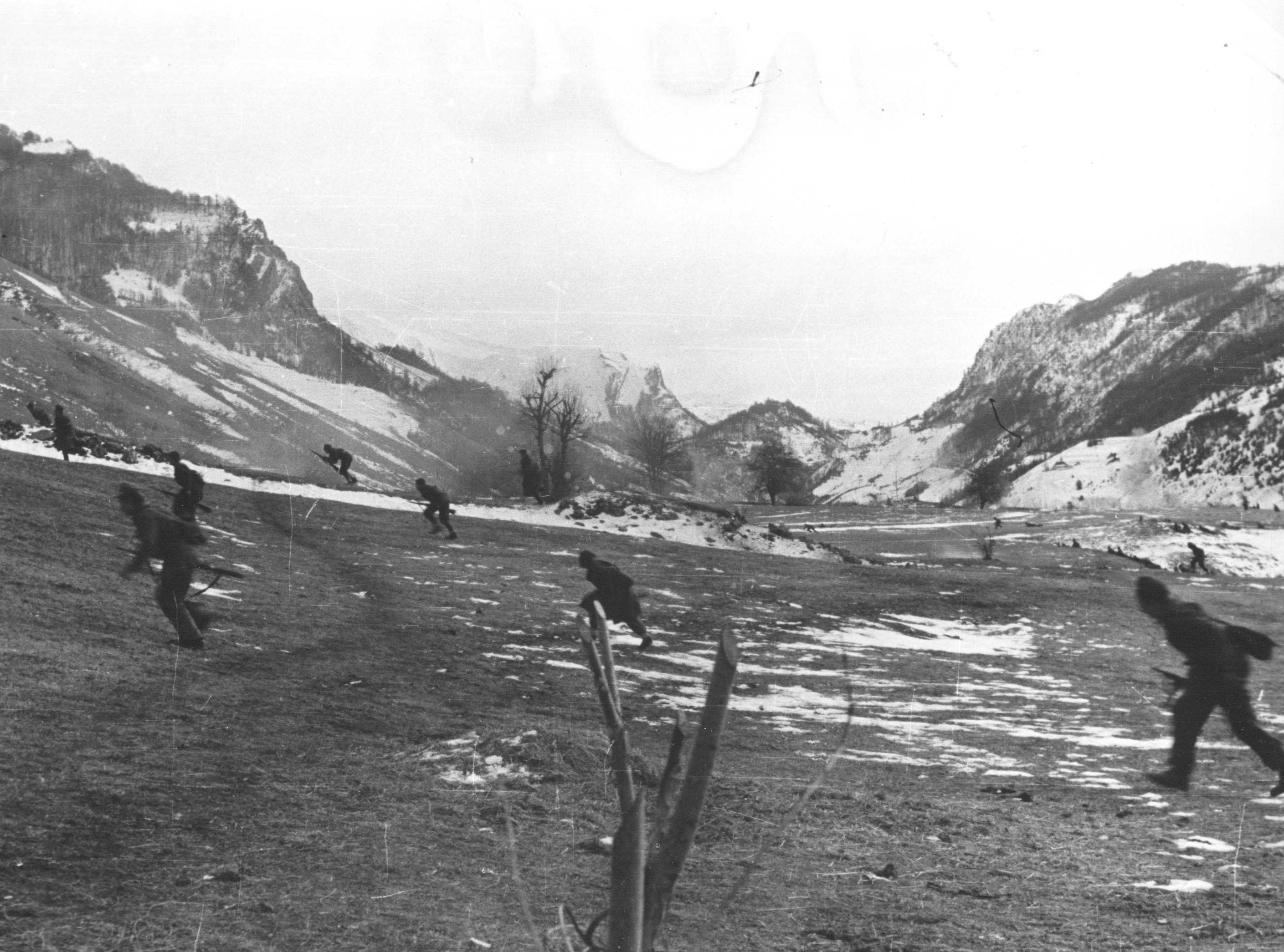 Srpskohrvatski / српскохрватски: Završne borbe za oslobođenje Crne Gore od Nemaca 1944.